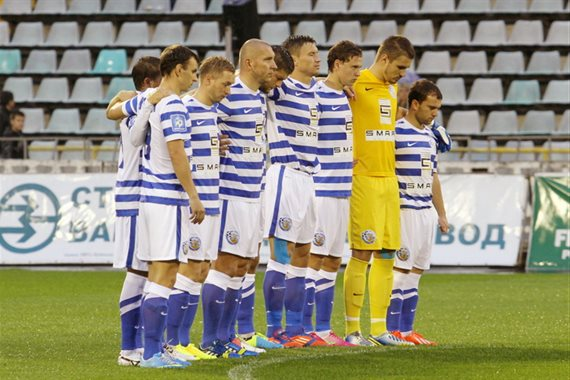 ФК Севастополь у 2013 році